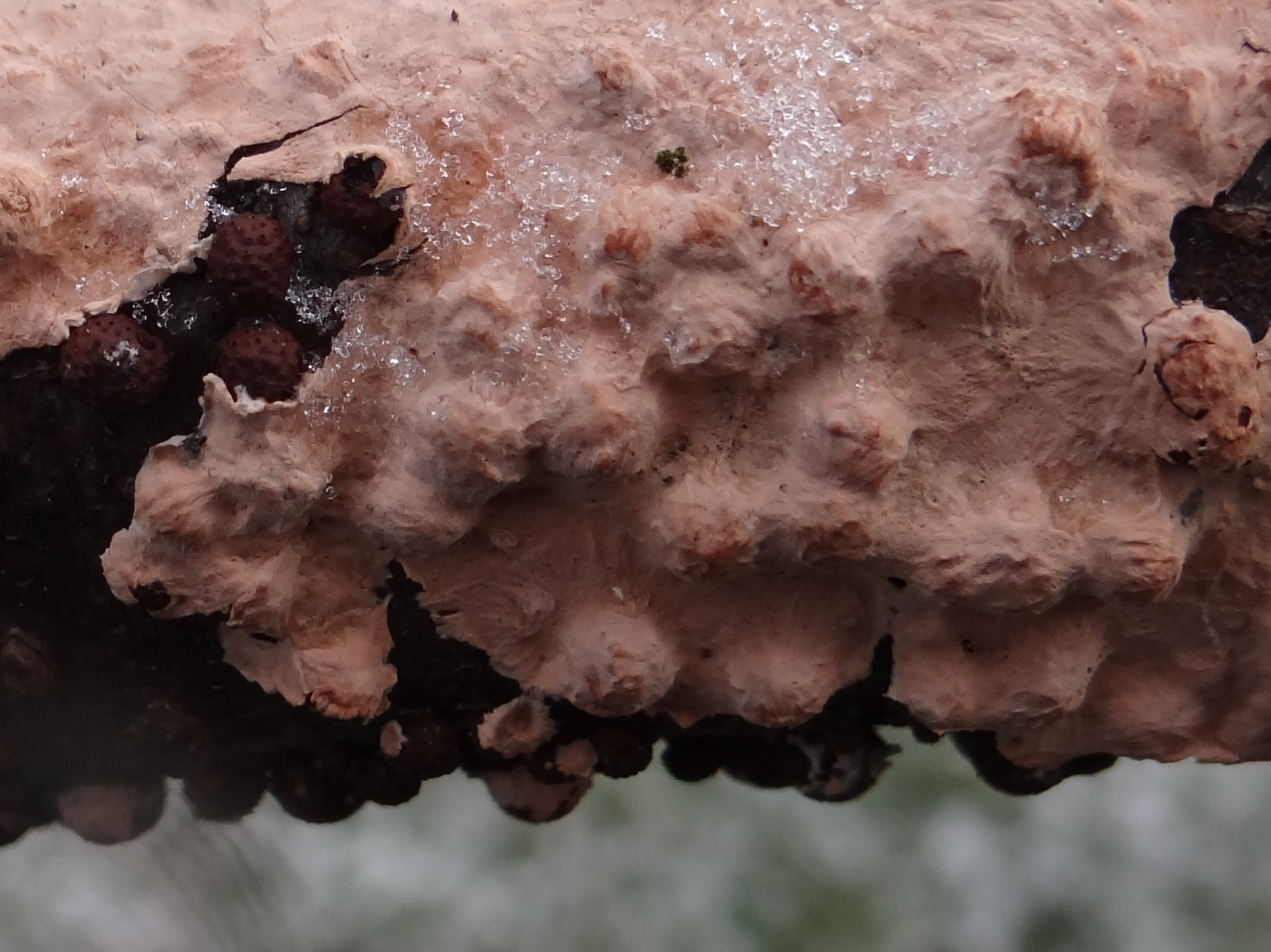 Peniophora violaceolivida